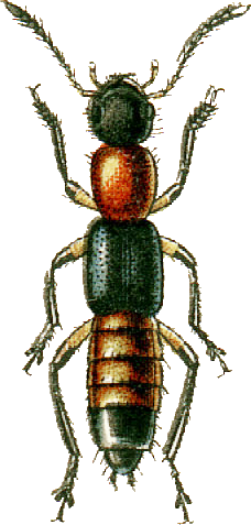 This file has been extracted from another file: Jacobs14.jpg